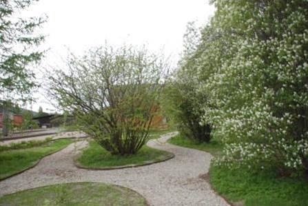 Stasjonsparken på Koppang stasjon